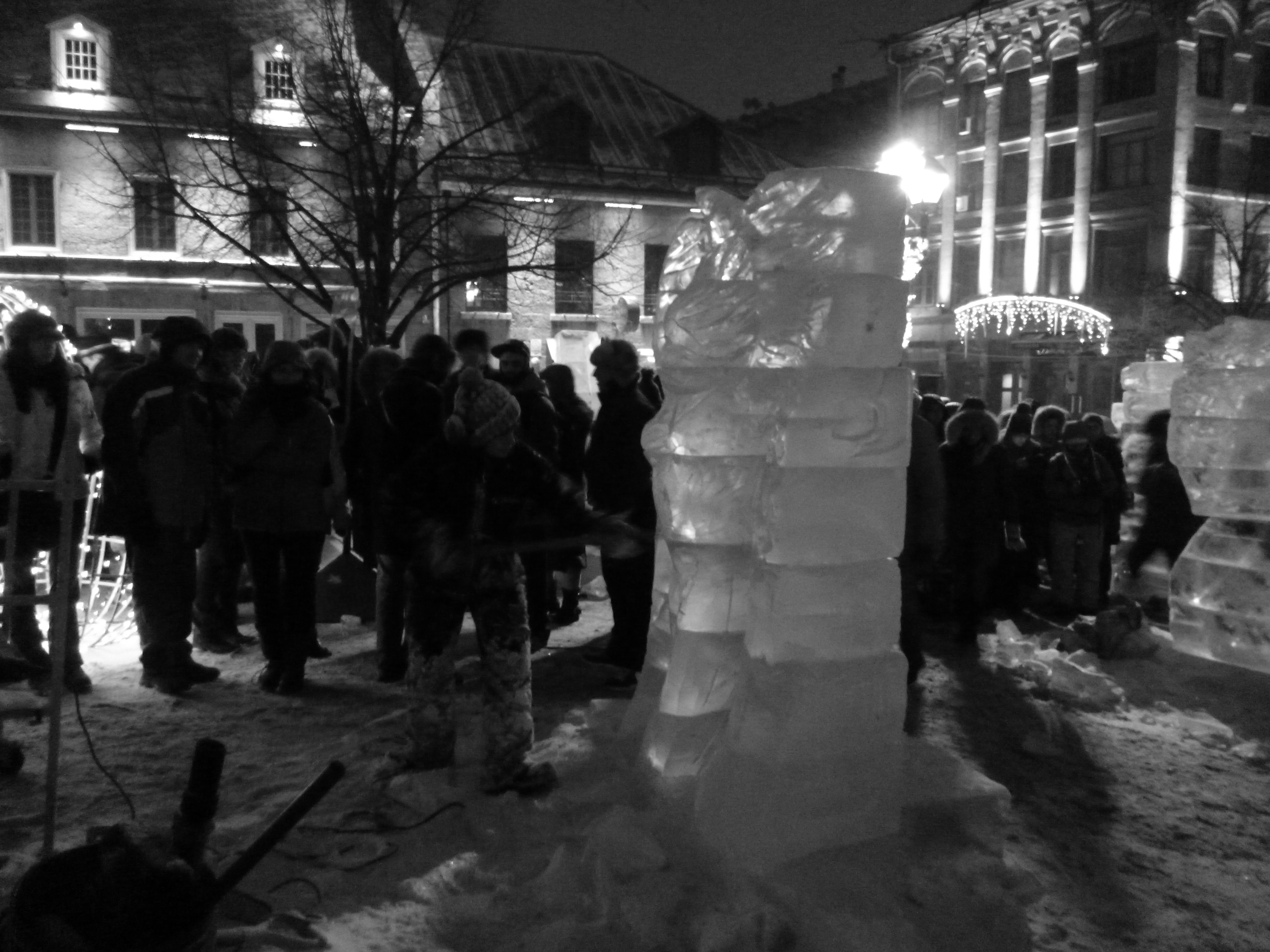 Un sculpteur sur glace, à Montréal, pendant Montréal en lumière.